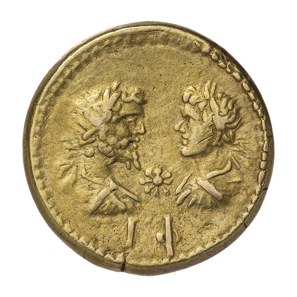 Боспорское царство. Савромат II (174—211). Статер. Ок. 209 г. Реверс. Бюст Септимия Севера напротив бюста Каракаллы. Между ними восьмиконечная звезда; внизу IФ. Точечный ободок.